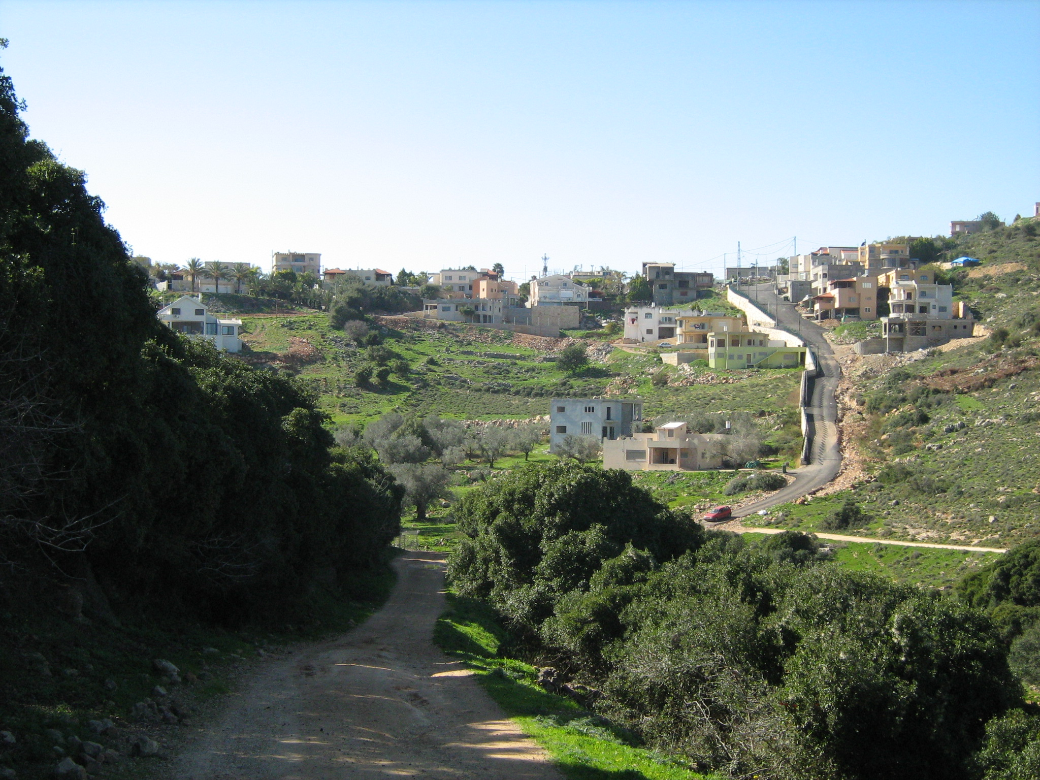 עוספיה